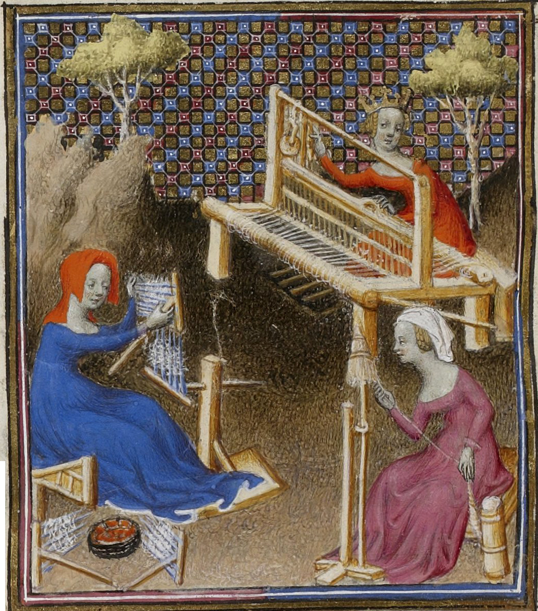 Женщины ткут, прядут и расчёсывают лён. Миниатюра из иллюминированной рукописи трактата Джованни Боккачо "О знаменитых женщинах". MS Fr. 598, f. 70v, Bibliotheque Nationale, Paris. Франция, XV век.